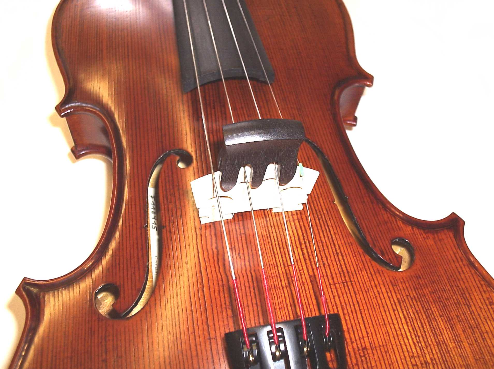 Bild eines Stegs einer Violine, mit Dämpfer